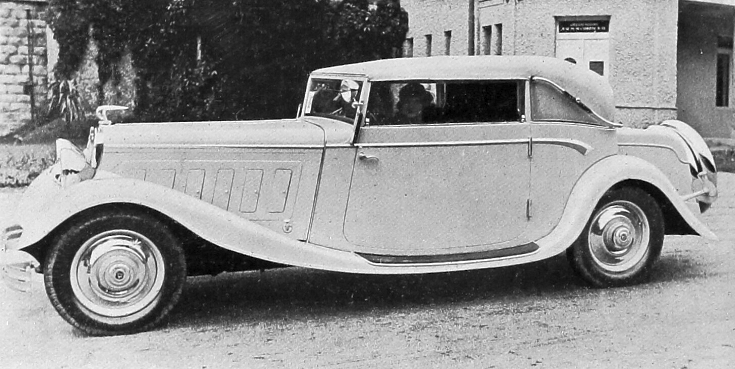 Wikov 70, luxusní kabriolet dr. Jandy z Prahy (Měsíc, červen 1933)